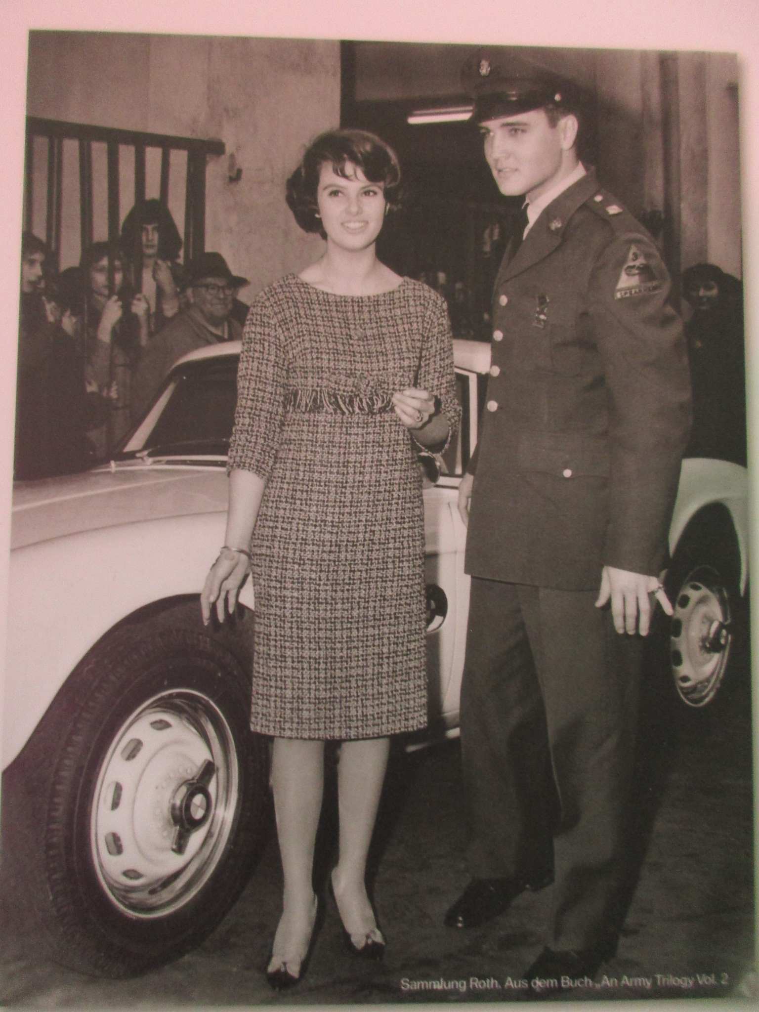 BMW 507 d'Elvis Presley in the BMW-Museum